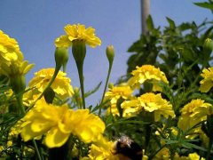 Voorbeeld scherptefilter